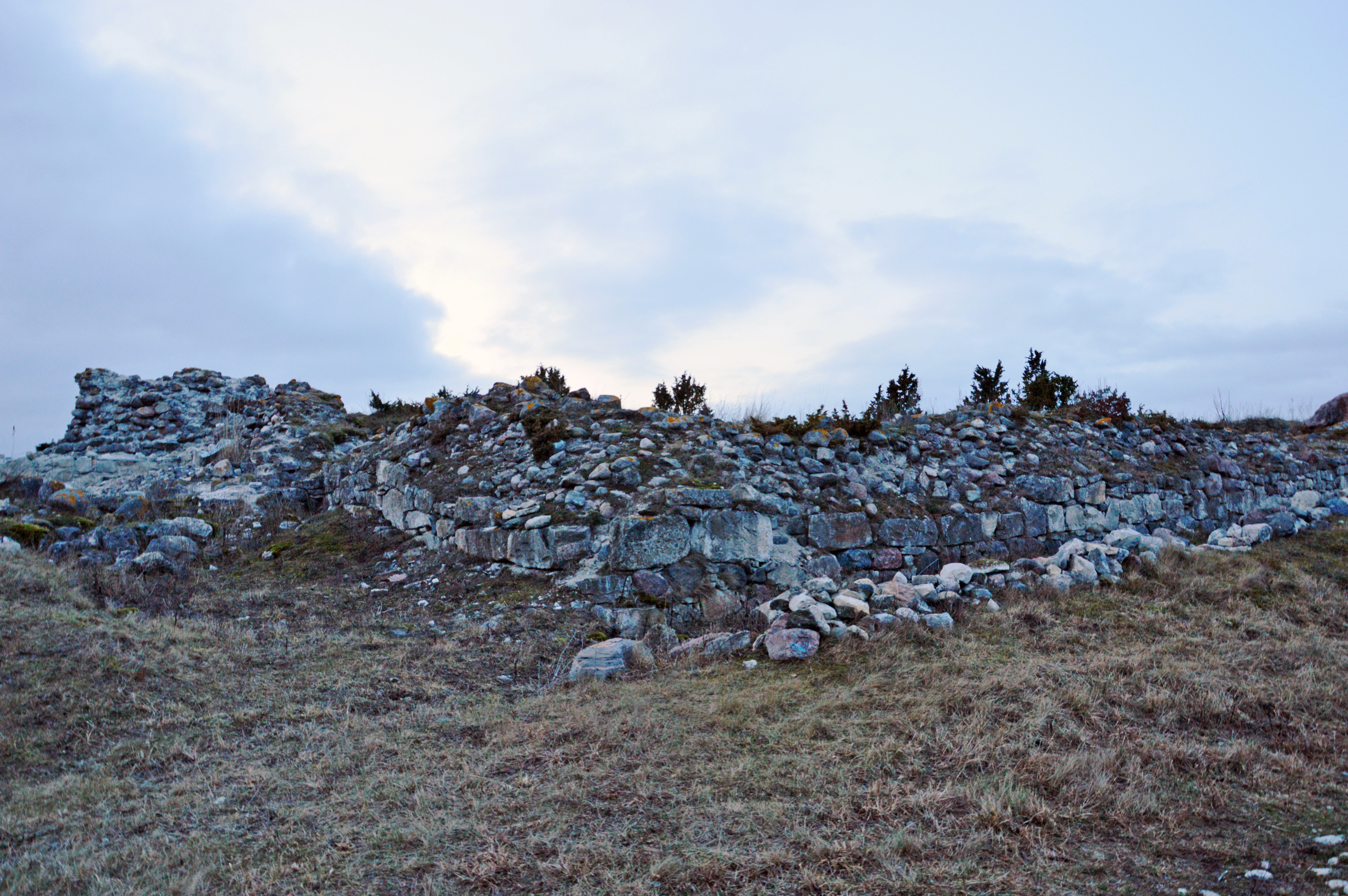 Virtsu vasallilinnuse varemed.